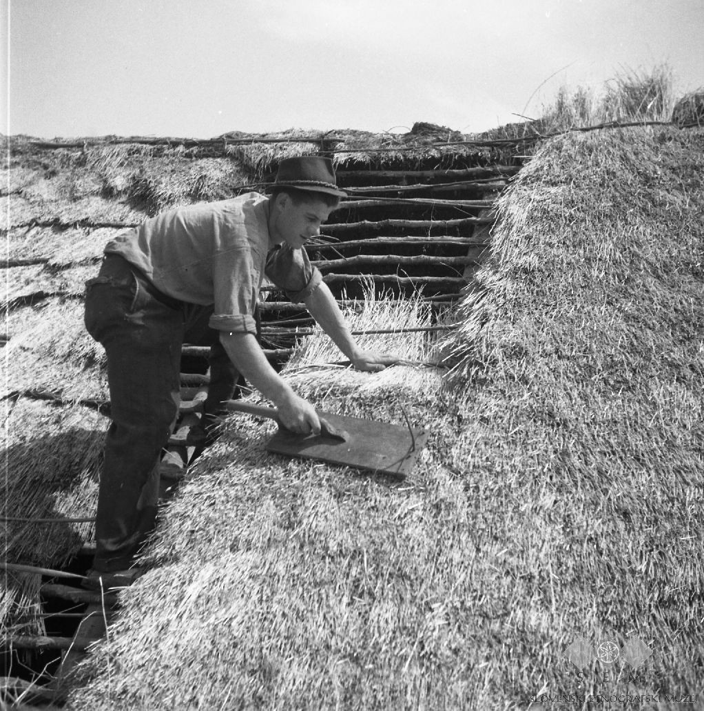 Krovec Slavko Štrumbelj, Mali Lipovec, pokriva streho na štali (hlevu) doma.